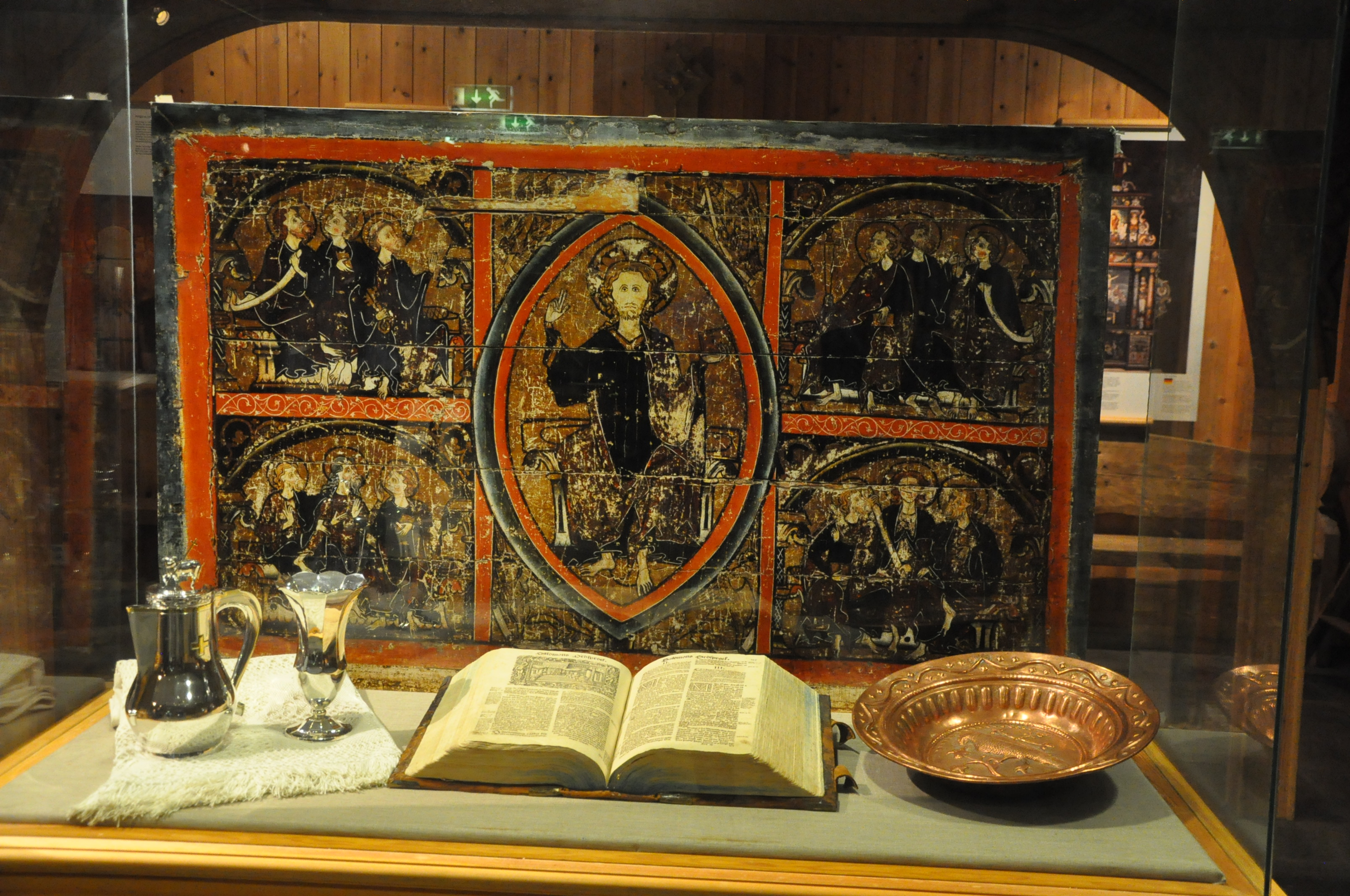 Kopi i full størrelse av antemesalet i Heddal stavkyrkje. Plassert i ein monter i pretegardslåven saman med andre skattar. Originalen er i Oldsaksamlinga til Universitet i Oslo. Antemesalet er truleg laga kring 1250 av ein handverkar på Austlandet. I midtstykket ser ein den dømande Jesus på dommedag i ei mandelforma ramme, og kring midtfelet er dei 12 apostlane fordeld tre og tre i fire kvadratiske felt. (kjelde for opplysningane: Anker, Leif: Kirker i Norge . B.4 . Middelalder i tre, stavkirker. ISBN 82-91399-16-6 - s. 177